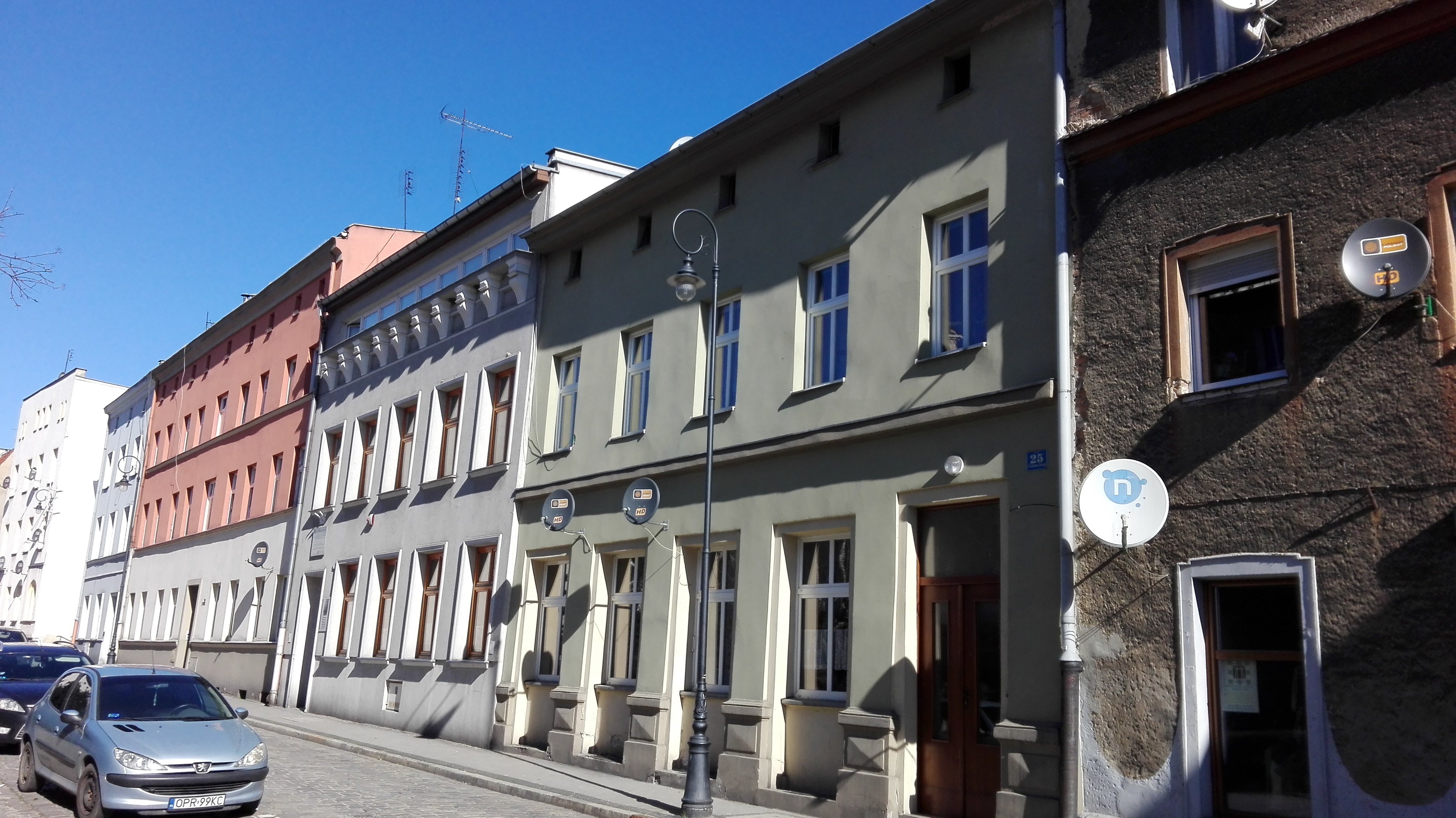 Prudnik, fragment ul. Królowej Jadwigi. Pod nr 23 Centrum Tradycji Tkackich - oddział Muzeum Ziemi Prudnickiej